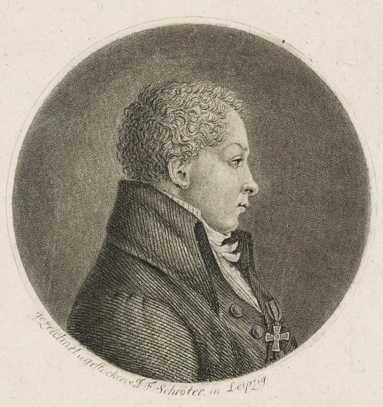 Johann Christian Rosenmüller (* 7./25. Mai 1771 in Hessberg; † 28./29. Februar 1820 in Leipzig), deutscher Mediziner